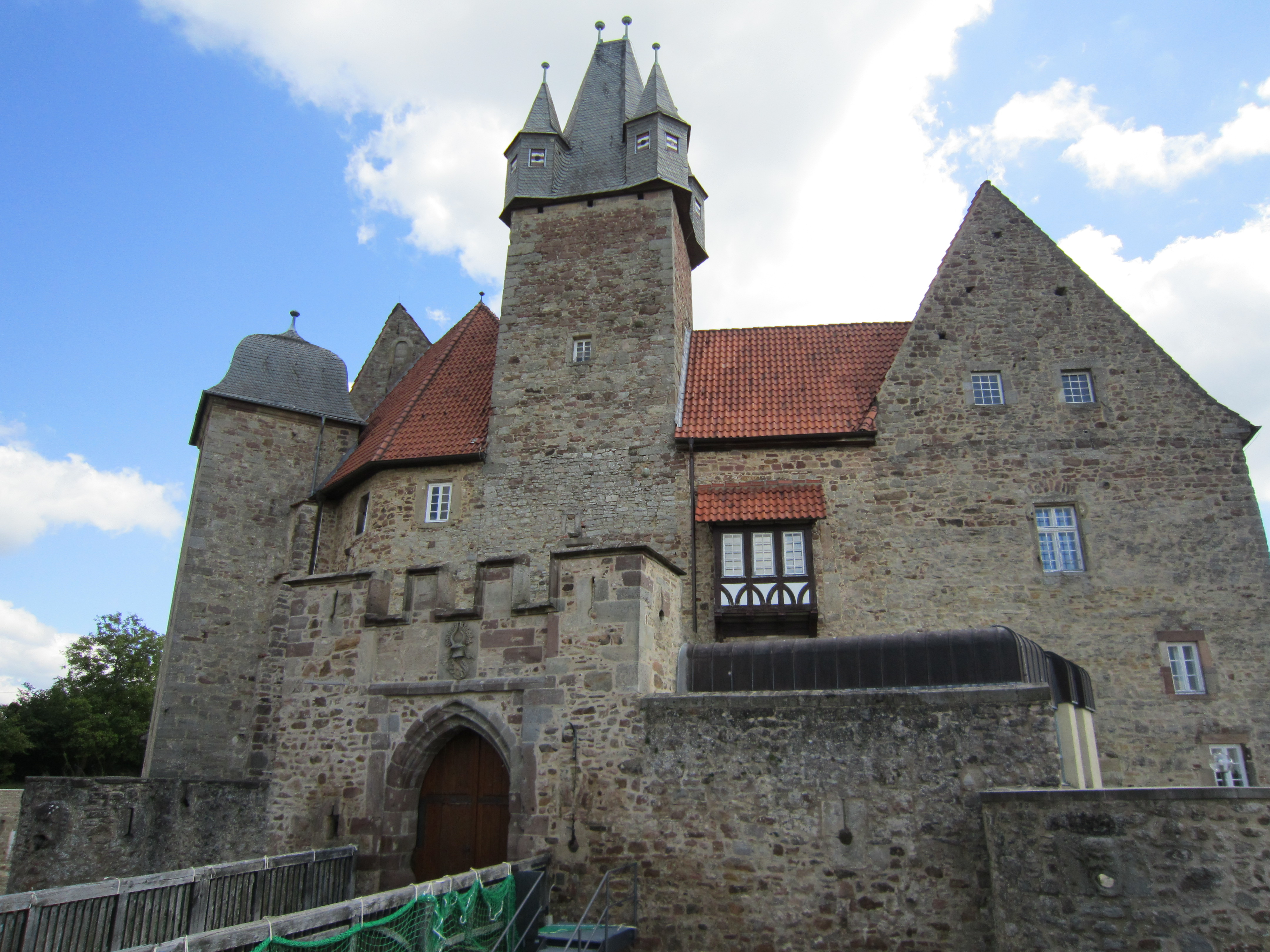 Kasteel Spangenberg